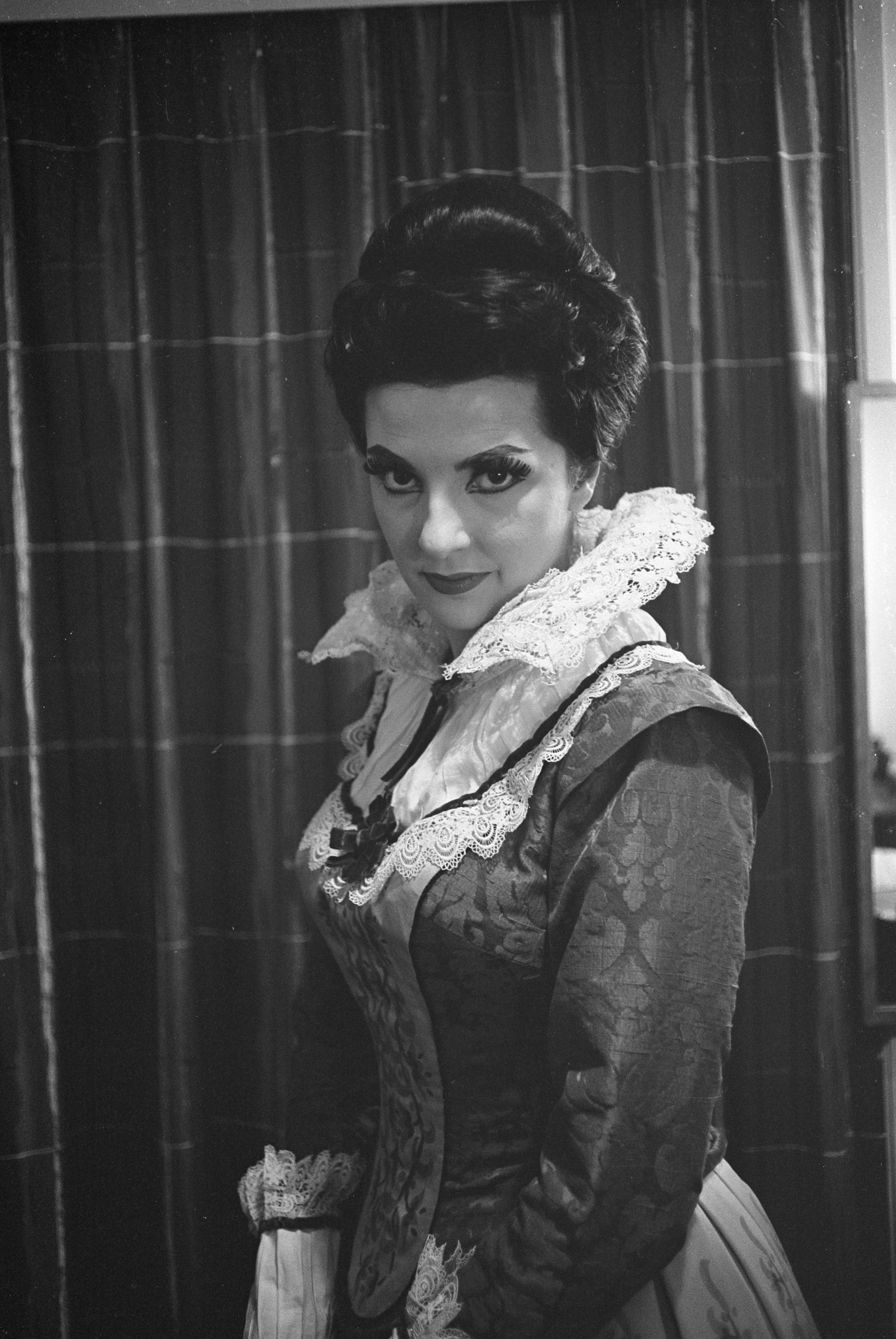 Opera I. Puritani in Stadsschouwburg. Anna Moffo